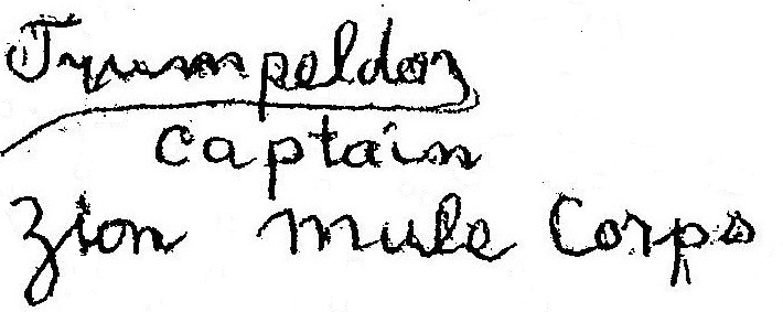 "טרומלדור, קפיטן, גדוד הפרדות הציוני" חתימתו של טרומפלדור מתקופת הגדוד, על אישור יציאה לחופשה של אחד מחייליו